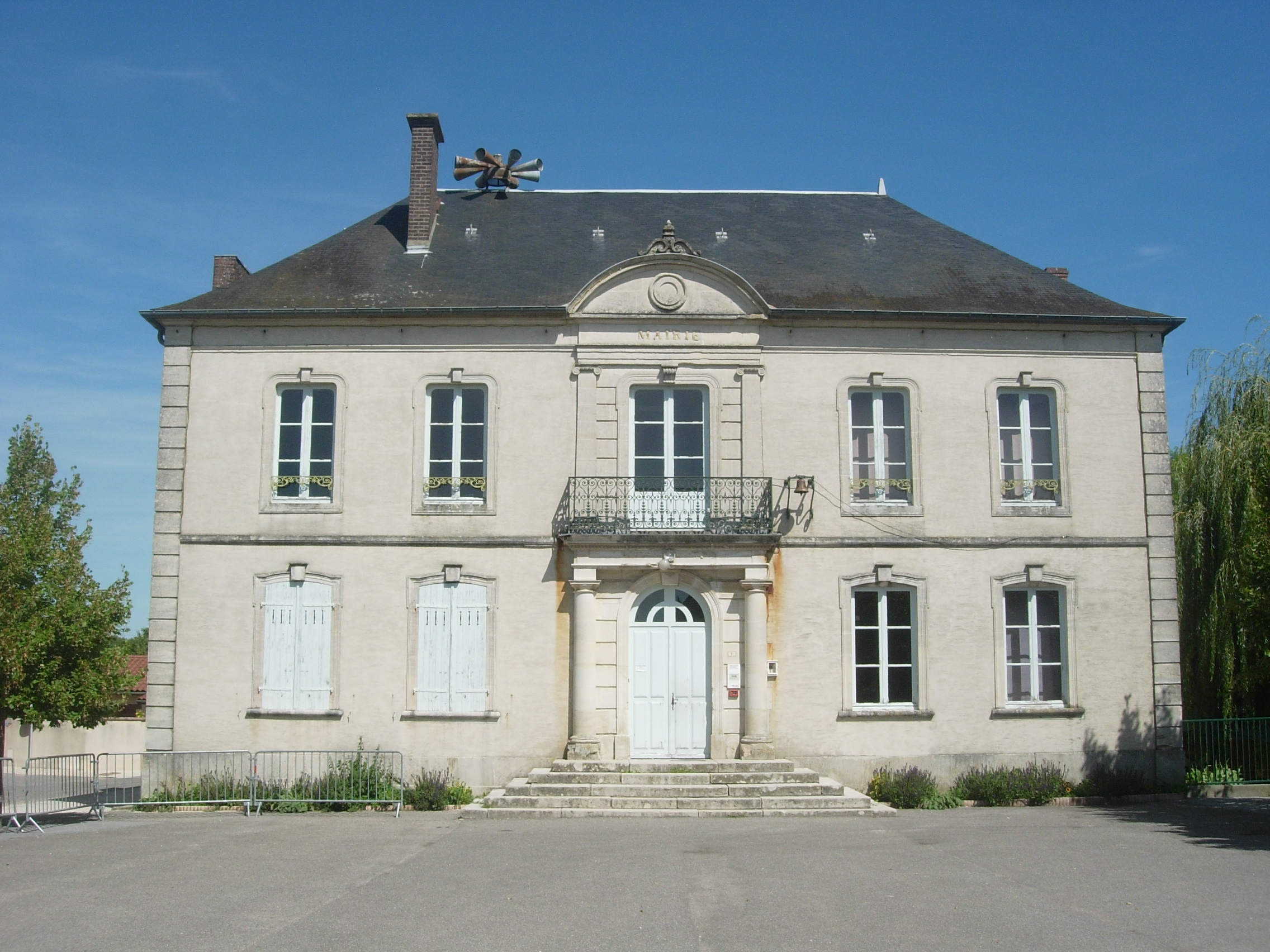 Mairie de Rosnay-l'Hôpital